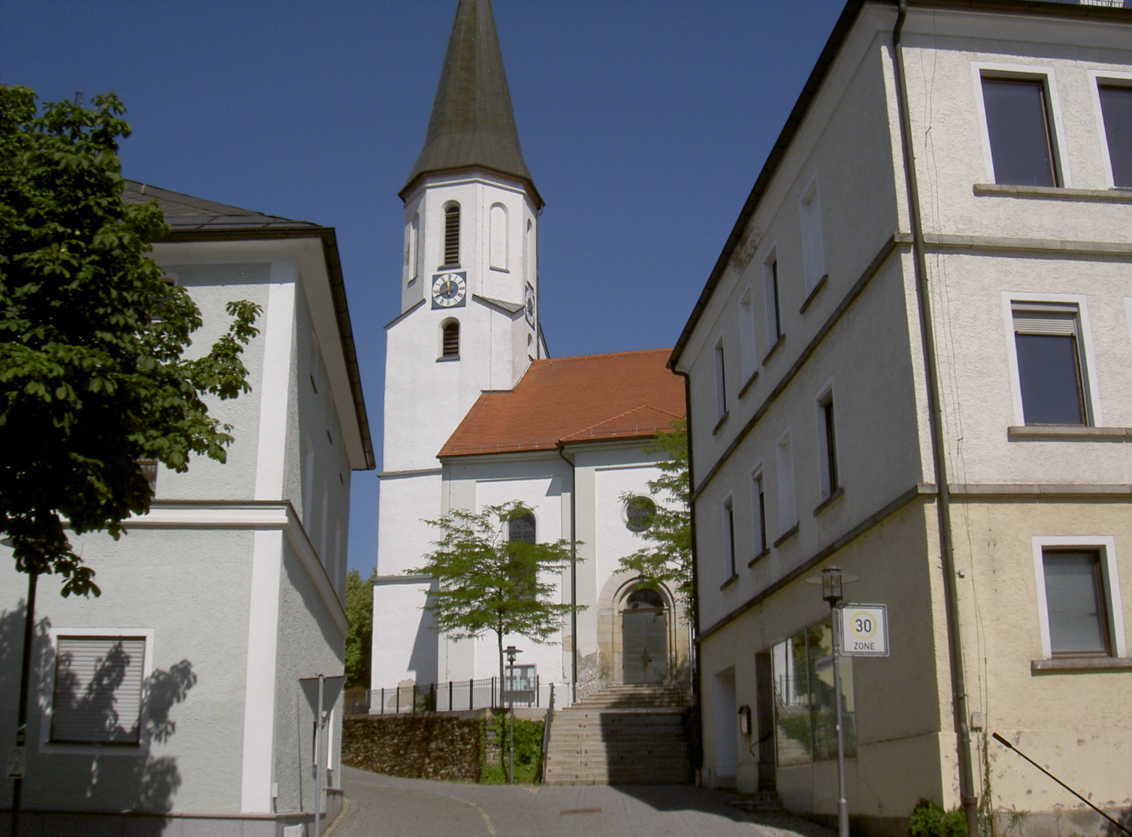 Schönsee Kirche St. Wenzeslaus von Süden